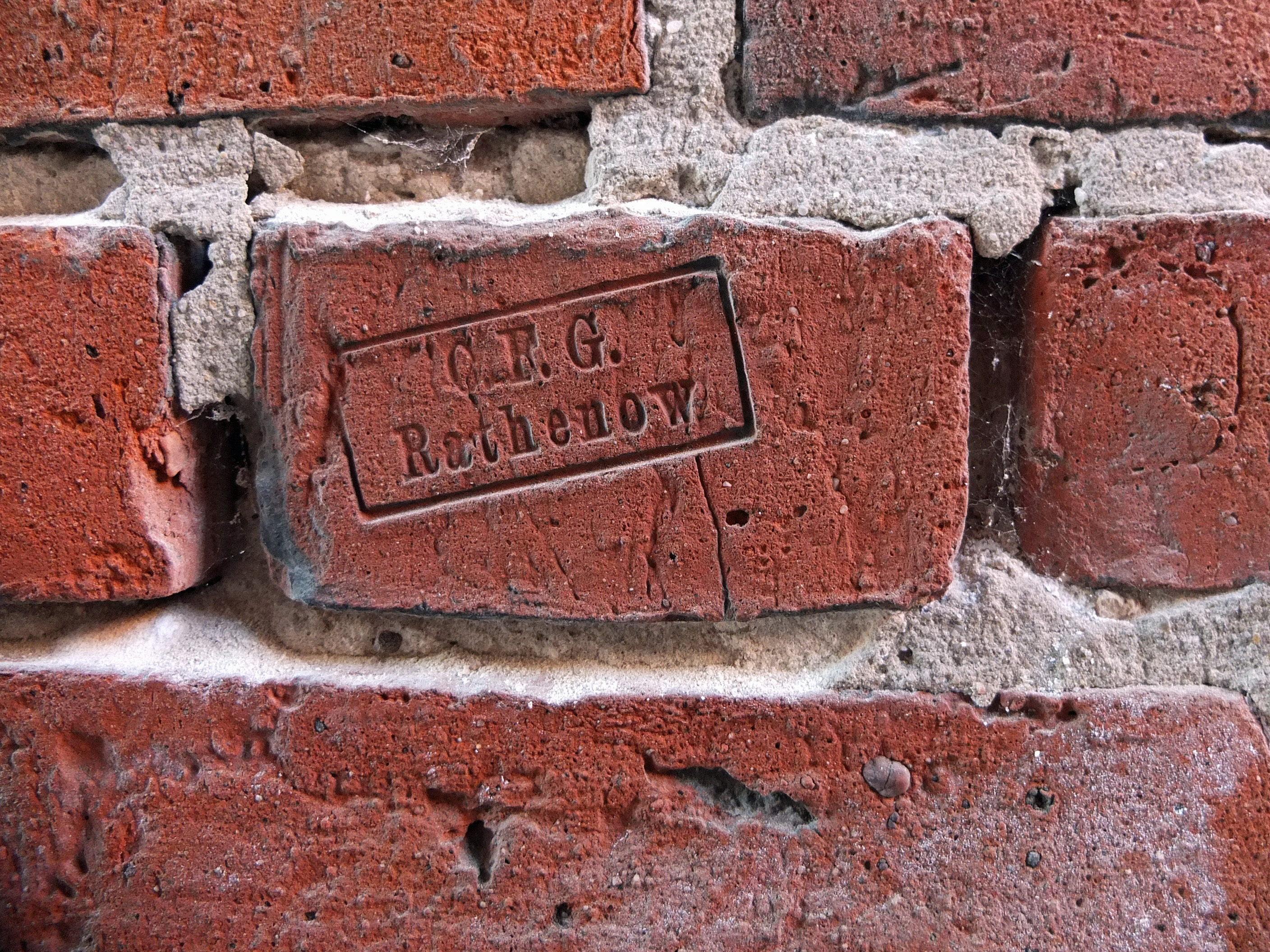 Ziegel mit Ziegelstempel C.F.G. / Rathenow an der ehem. Maschinenfabrik Fr. Gebauer und Bleicherei in Berlin-Charlottenburg.